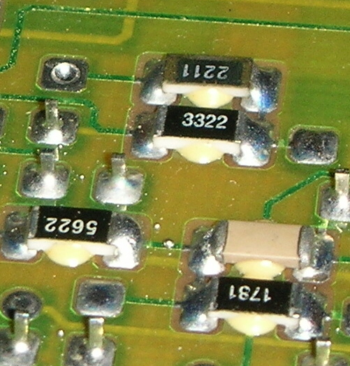 SMD Bauelemente auf gemischt-bestückter Platine